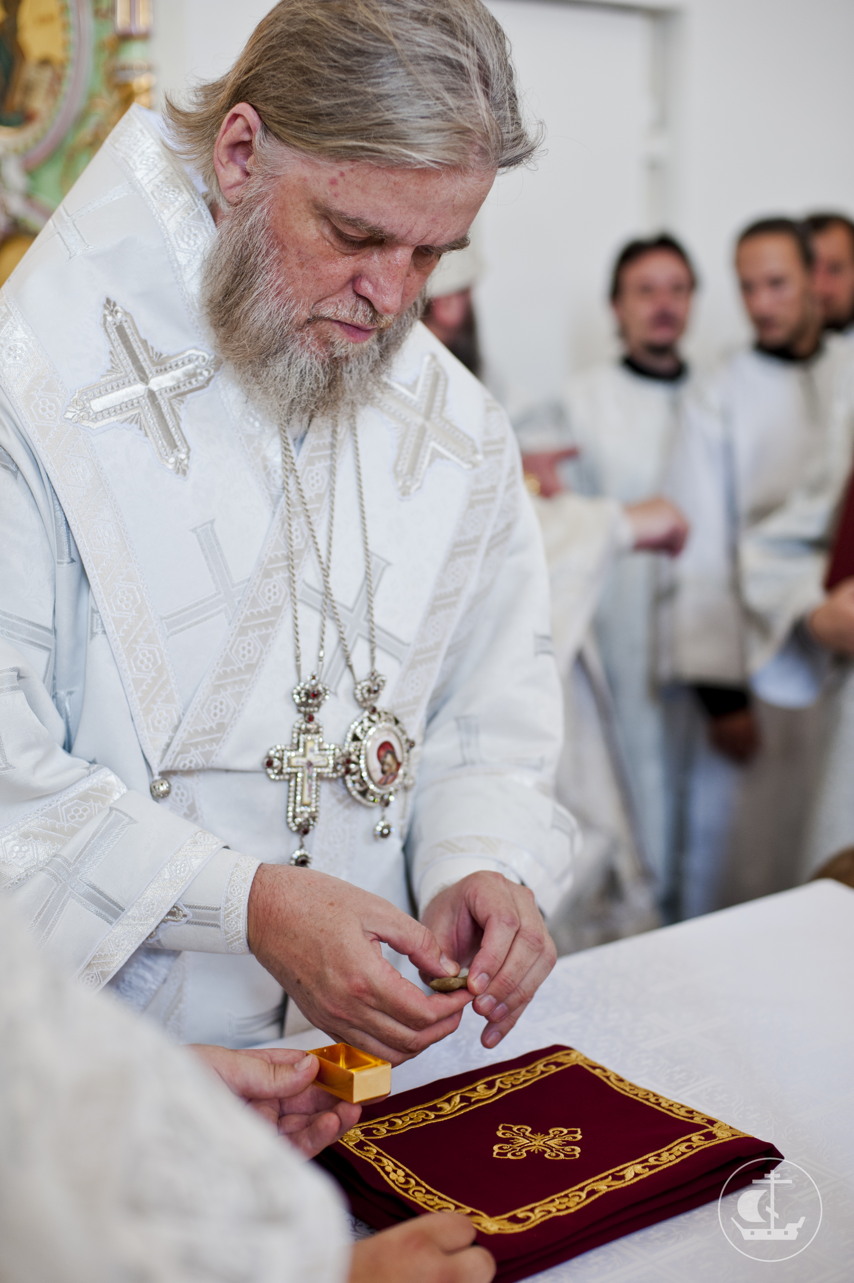 14 июля 2013, Освящение Троицкого кафедрального собора г. Железногорска